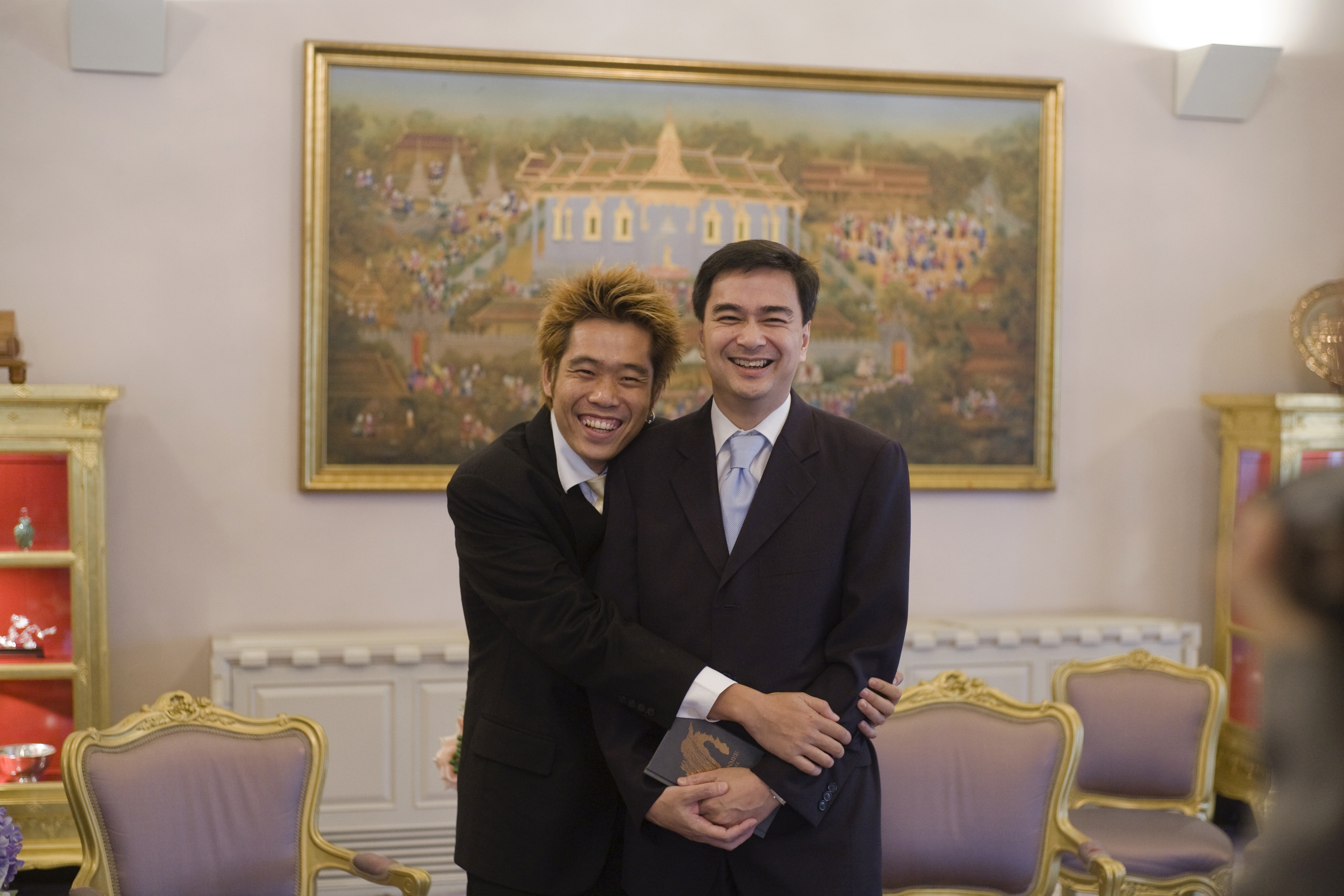 รัฐมนตรีว่าการกระทรวงวัฒนธรรม นำ นายอภิชาตพงศ์ วีระเศรษฐกุล ผู้กำกับภาพยนตร์ พร้อมทีมงานผู้ผลิตภาพยนตร์ "ลุงบุญมีระลึกชาติ" เข้าเยี่ยมคารวะ นายกรัฐมนตรี ณ ห้องสีม่วง ตึกไทยคู่ฟ้า ทำเนียบรัฐบาล วันที่ 10 มิถุนายน 2553 (The Official Site of The Prime Minister of Thailand Photo by พีรพัฒน์ วิมลรังครัตน์)